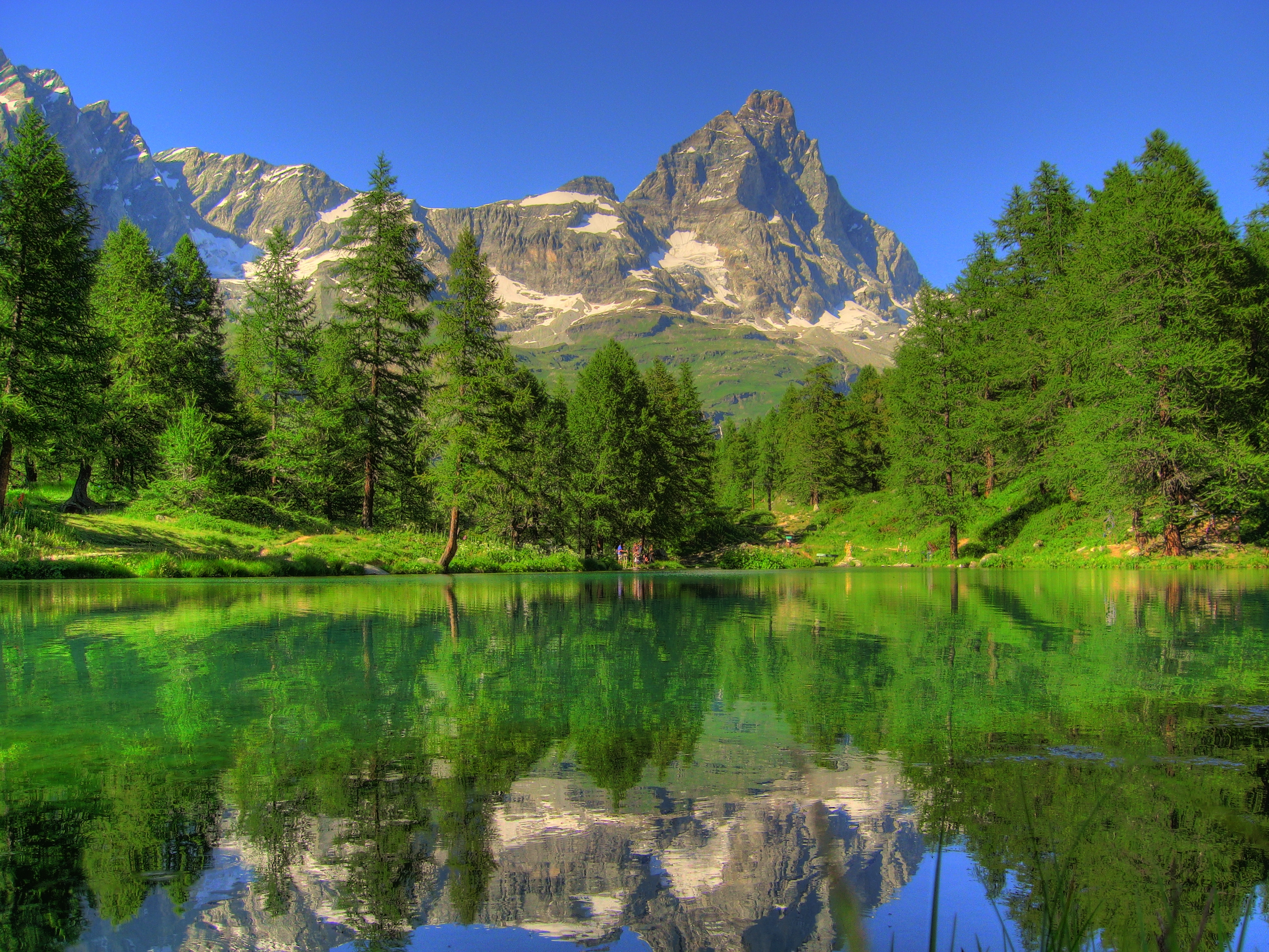 Monte Cervino dal Lac Bleu This is a photo of a monument which is part of cultural heritage of Italy.